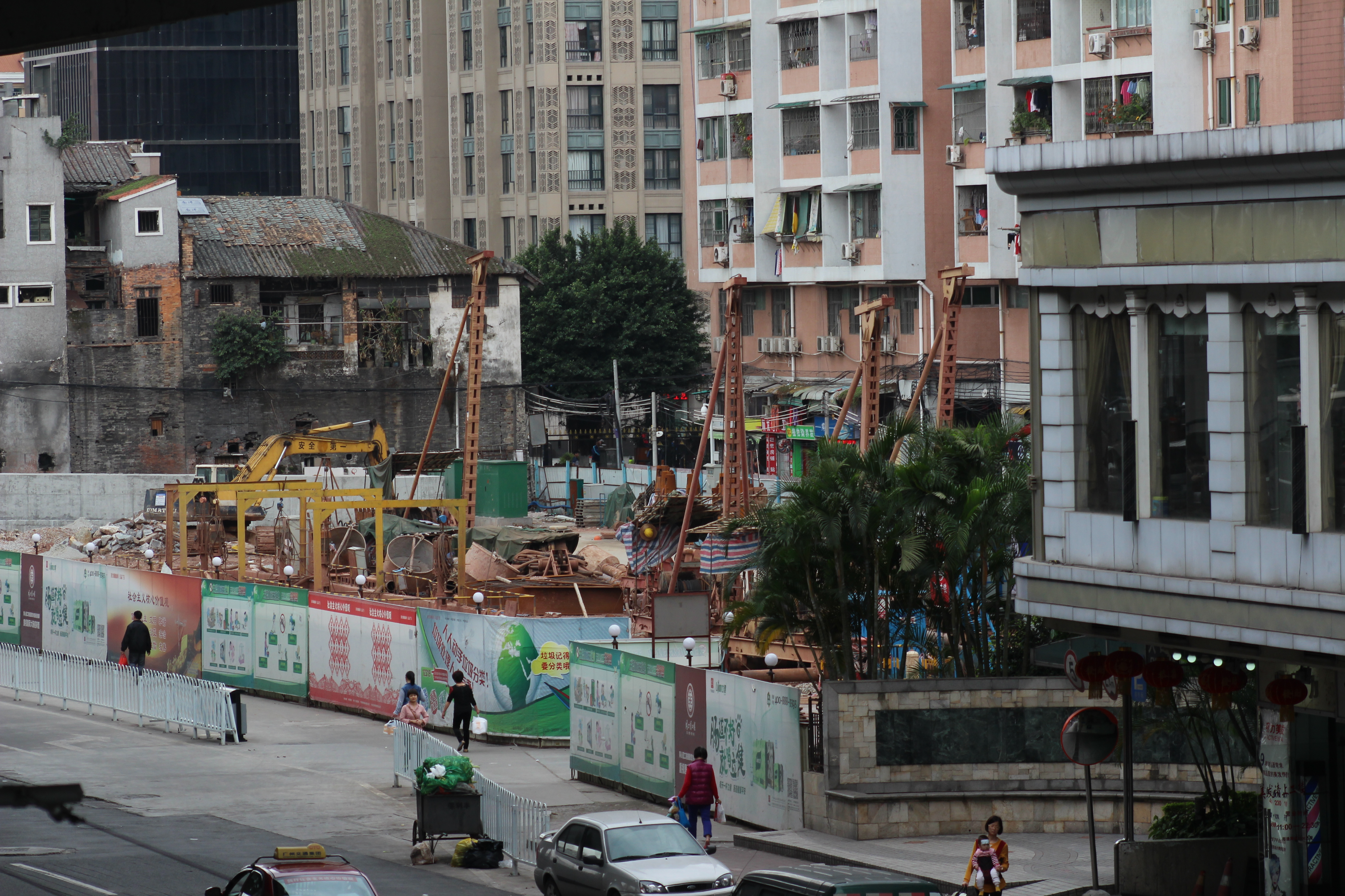 同福西站施工现场